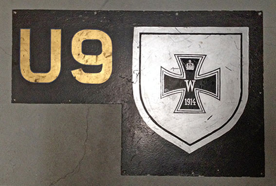 U 9 im Einsatz